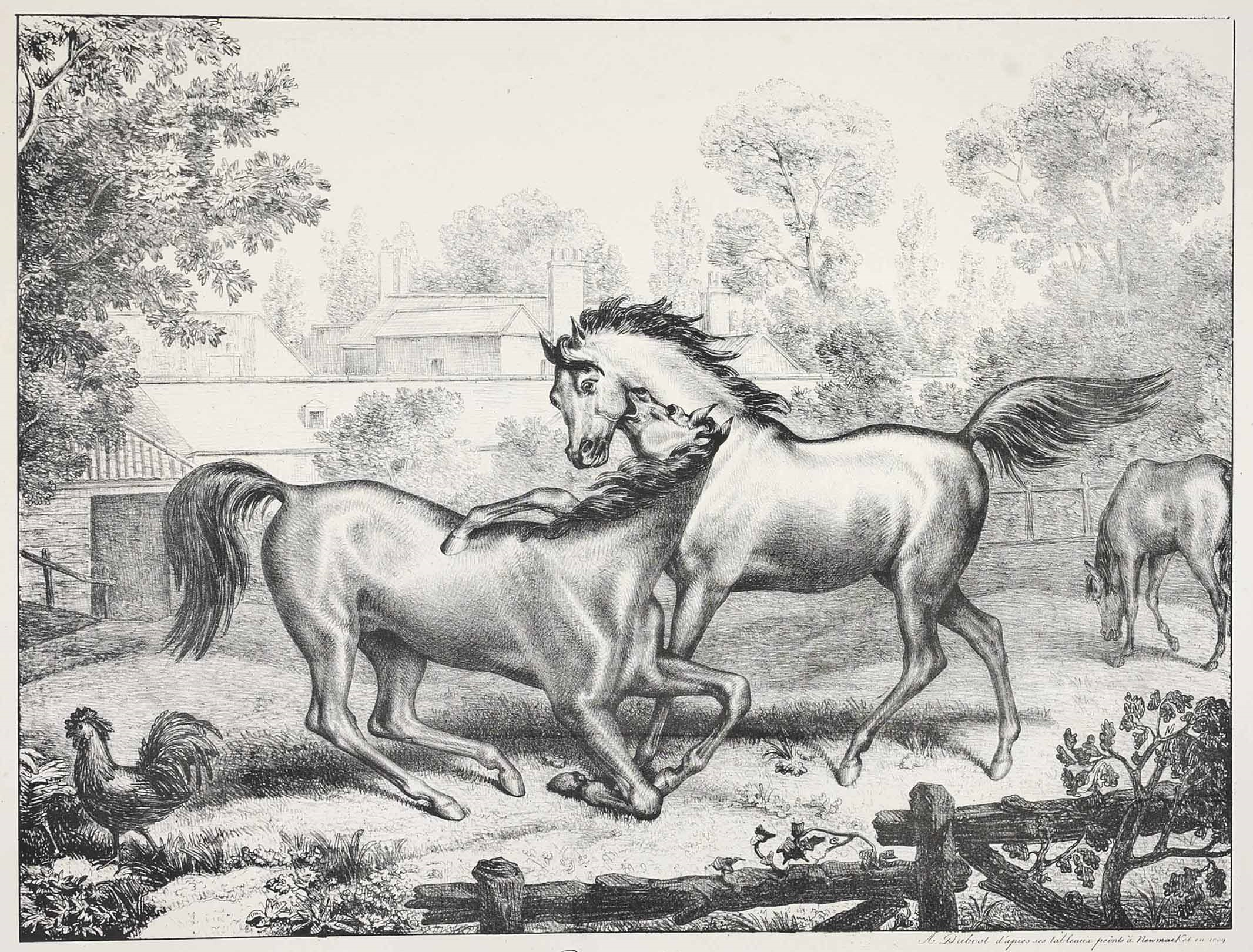 Le Cheval de course dans le haras, lithographie de 1818 d'après un tableau peint à Newmarket en 1809.